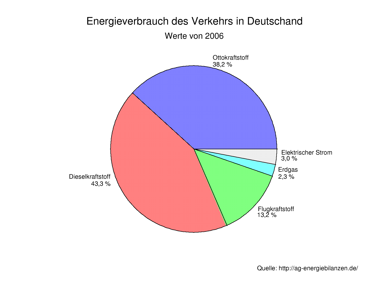 Prozentuale Anteile von Energieträgern am Verkehrsgeschehen in Deutschland im Jahre 2006